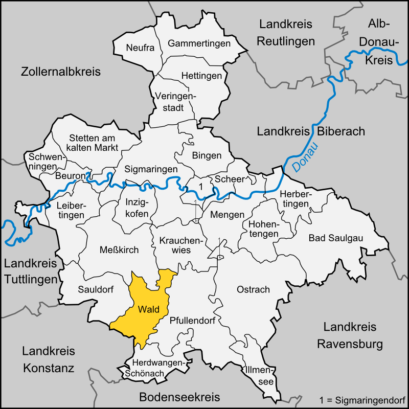 Karte der Gemeinde Wald im Landkreis Sigmaringen